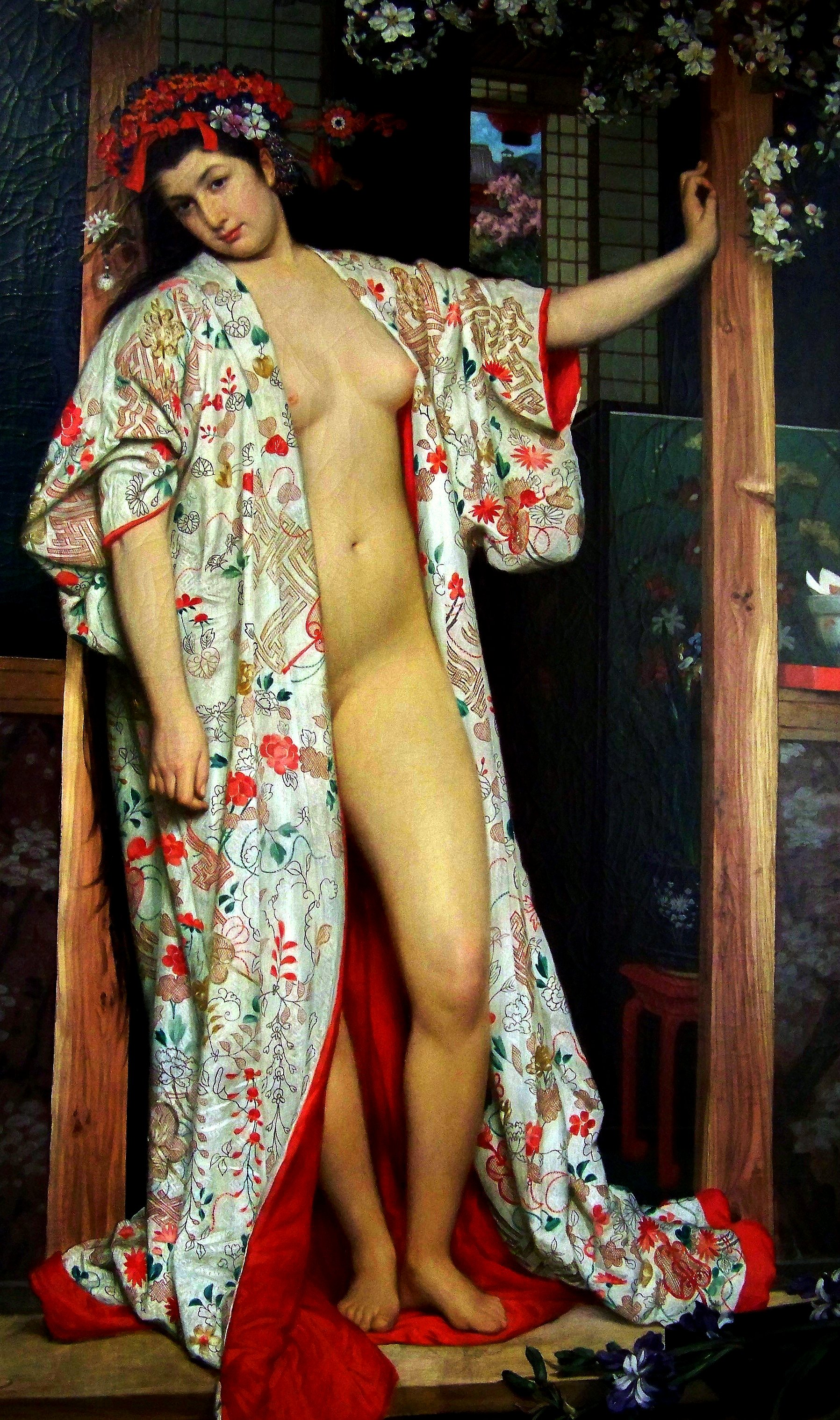 La Japonaise au baintitle QS:P1476,fr:"La Japonaise au bain" label QS:Lfr,"La Japonaise au bain"